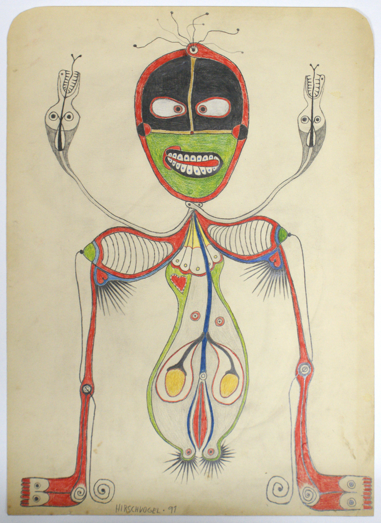 Hirschvogel Zeichnung 1991